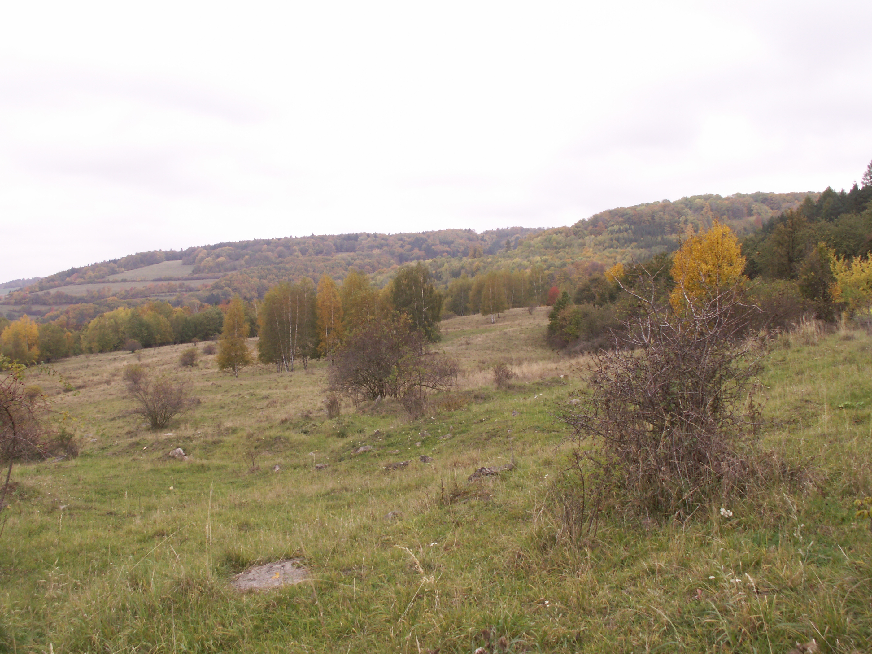 přírodní památka Dobrá studně, severně obce Ochoz u Tišnova, okres Brno-venkov